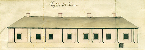 Burgmanin talo Helsingissä.